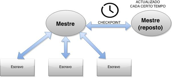 mestre escravo reposto